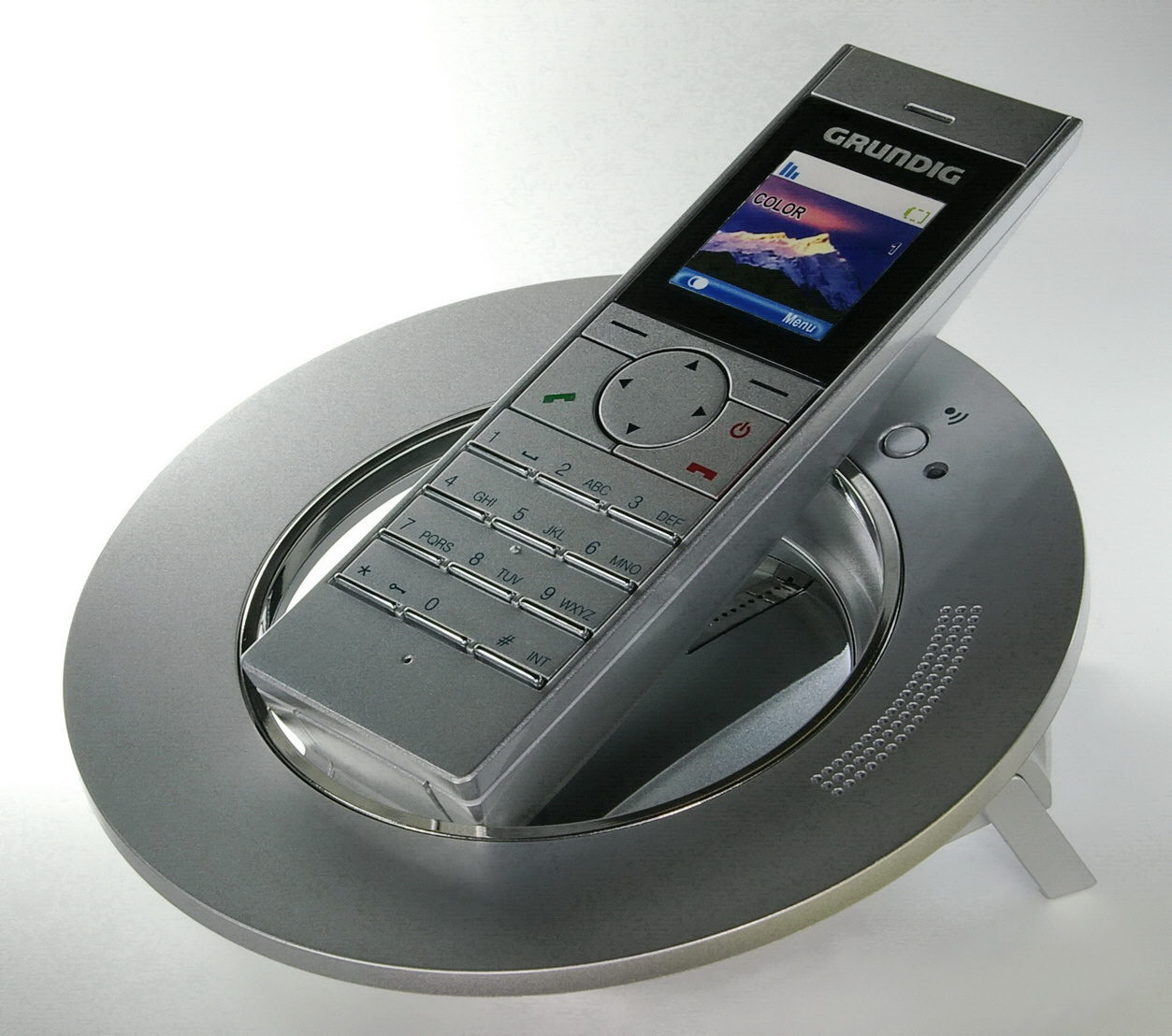 DECT-Telefon auf Ladestation der Marke Grundig, Type Sinio A1 mit Anrufbeantworter